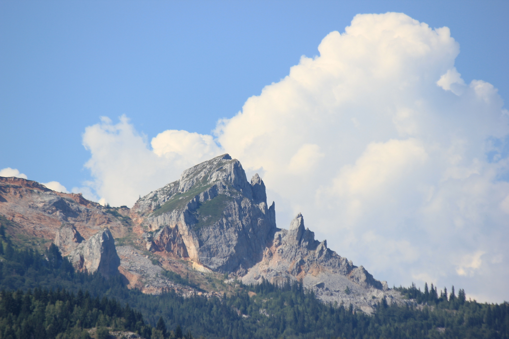 Felsen an der Südseite der Jahorina, Bosnien und Herzegowina.Hornjoserbsce: Skalizna při južnym boku Jahoriny, Bosniska a Hercegowina.